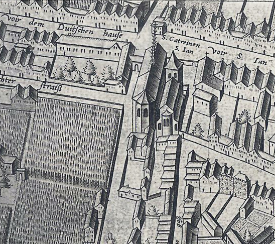 Ausschnitt des Mercator - Stadtplanes, Bereich St. Katharinen/St. Johann Baptist